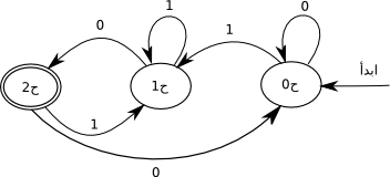 DFA Arabic